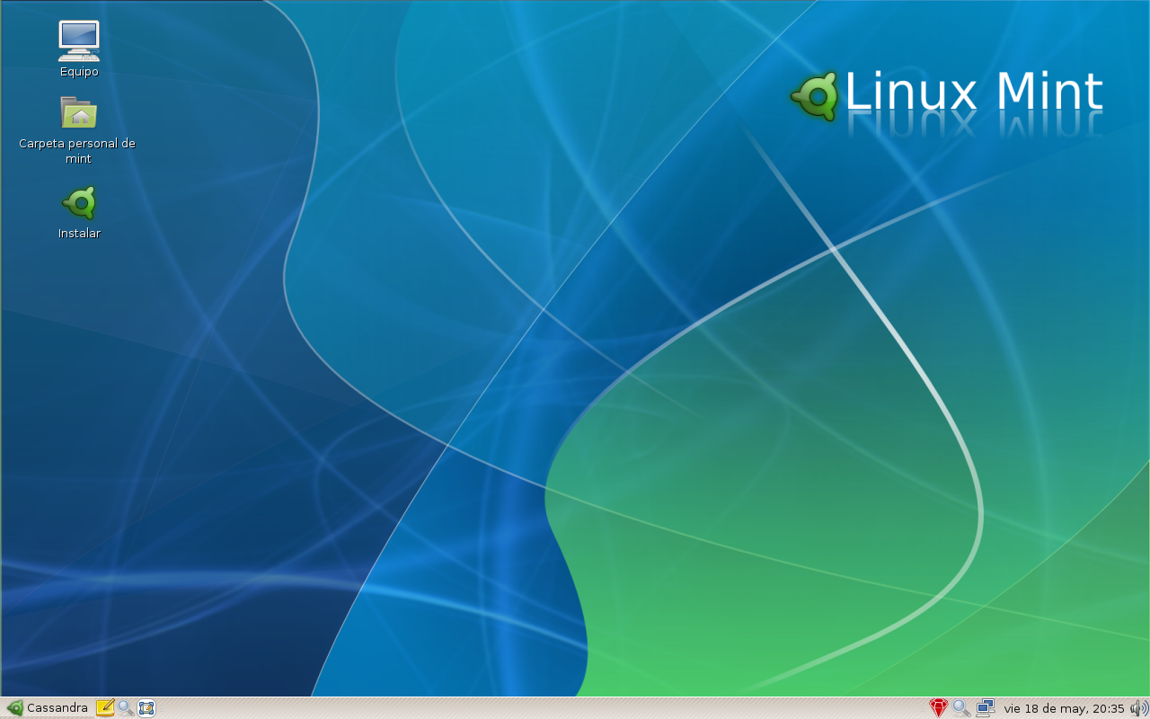 Captura de la distribución Linux llamada "Linux Mint", versión 3.0, cambiando fondo de pantalla.